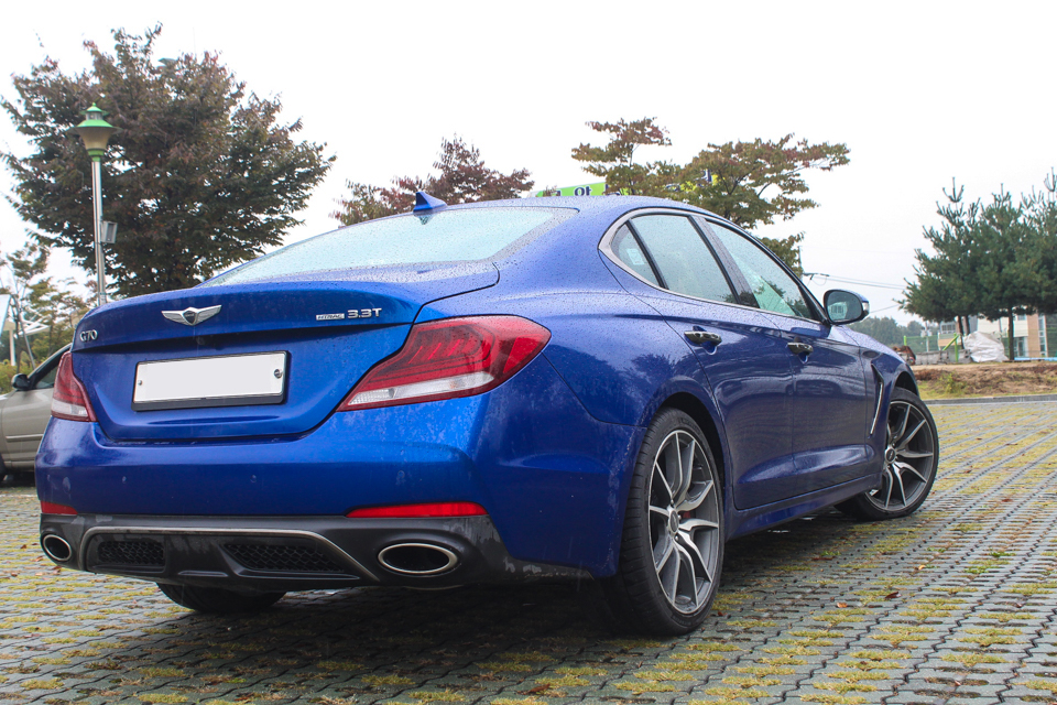 제네시스 G70 후측면